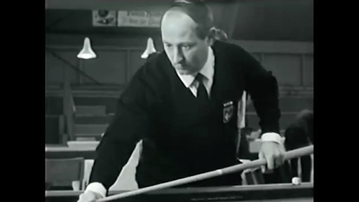 Jean Marty